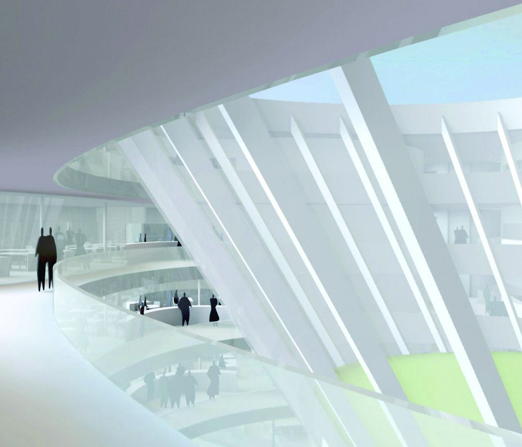 Contencioso 01